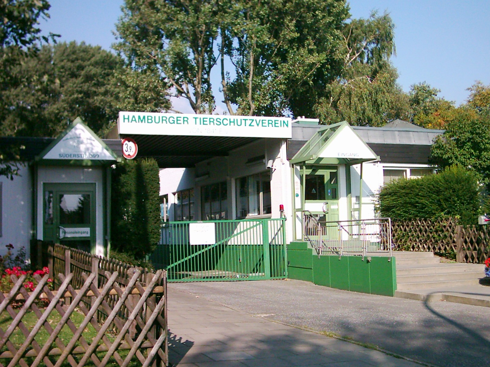 Das Tierheim Süderstraße des Hamburger Tierschutzvereins, Hamburg-Hamm. Siehe auch Image:Tierheim Süderstraße 01.jpg.